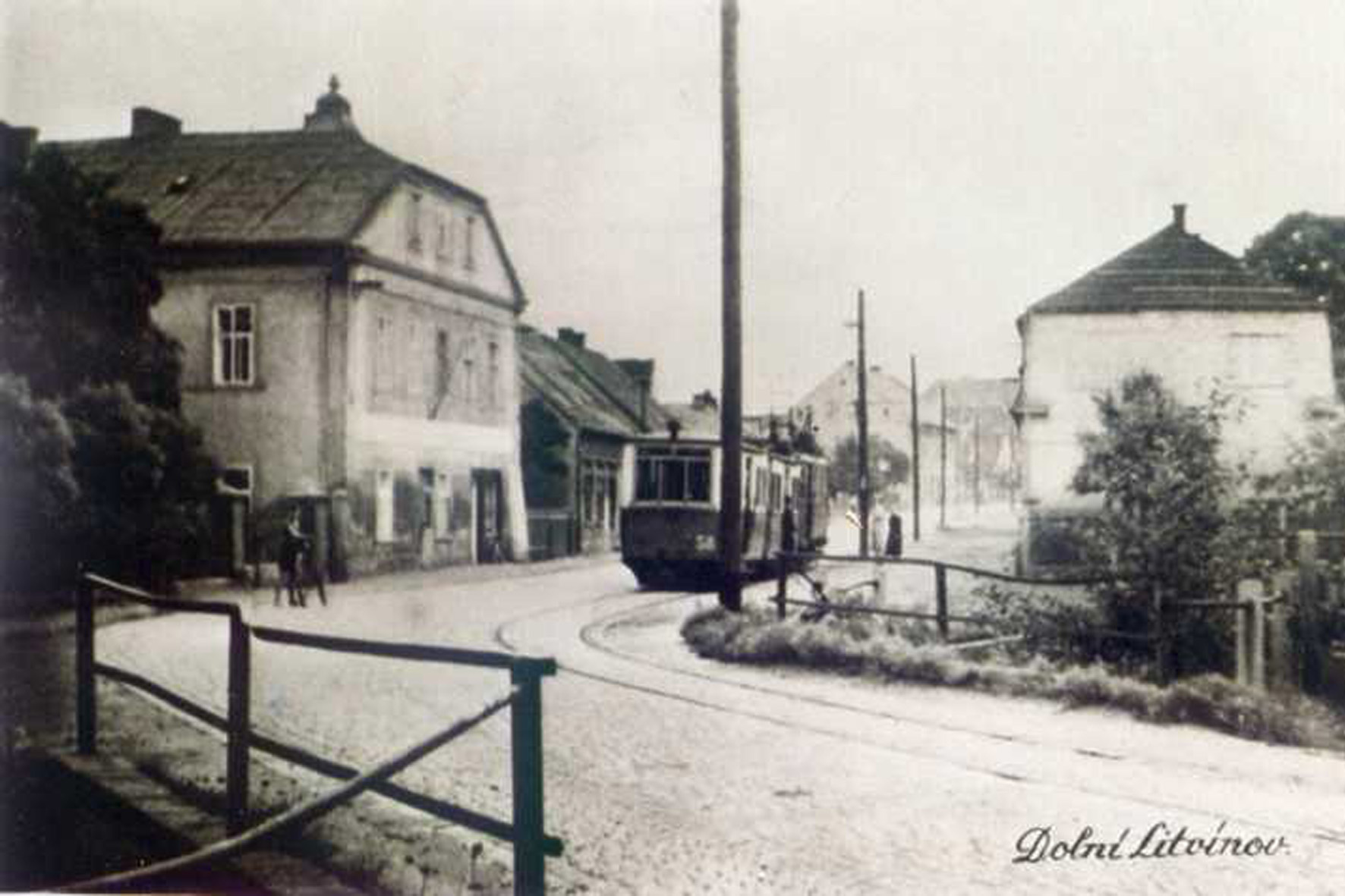 Ehemaliges Dorf Dolní Litvínov (Niederleutensdorf).